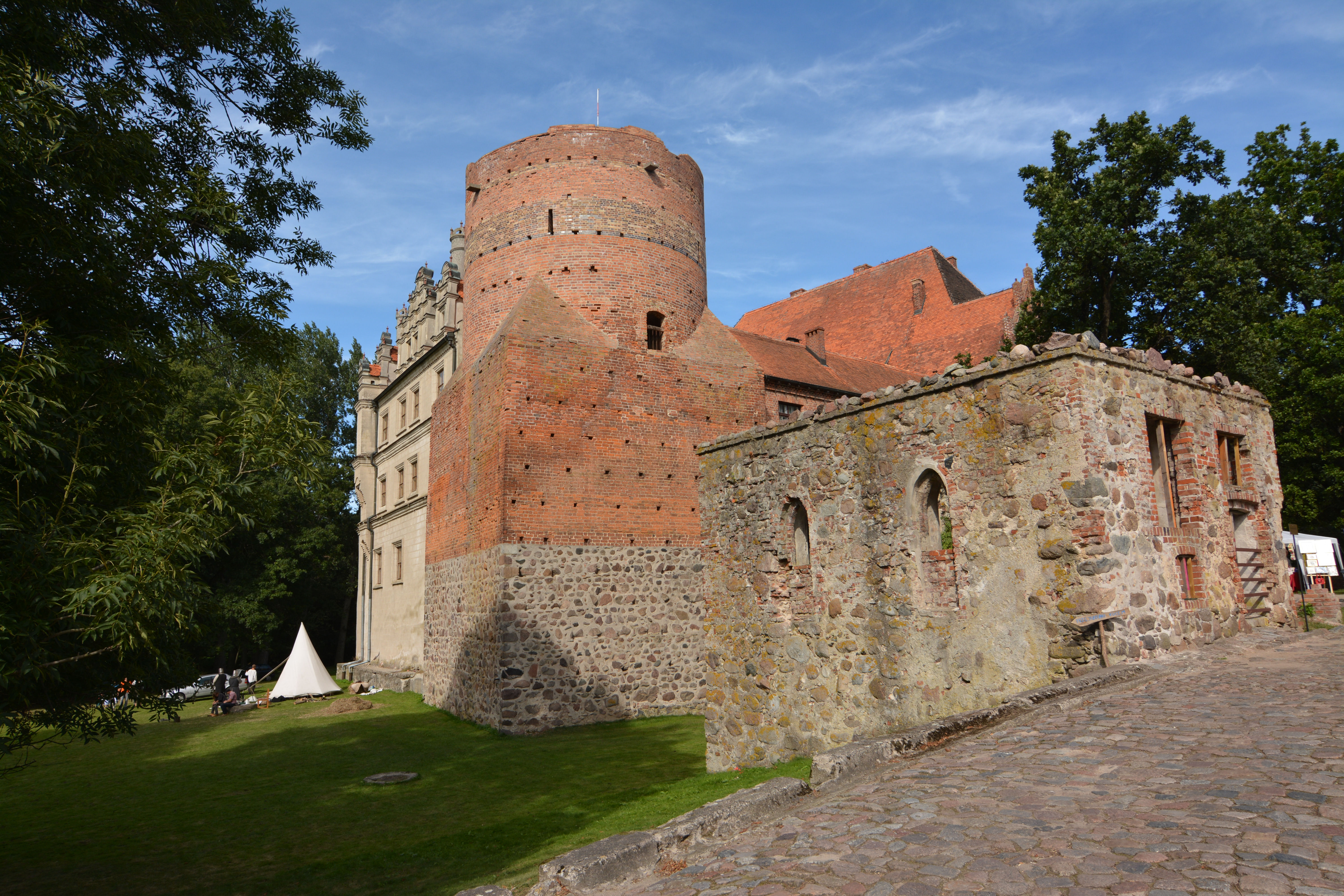 Pęzino - zamek, XIV, 1 poł. XVI, 1600, XIX